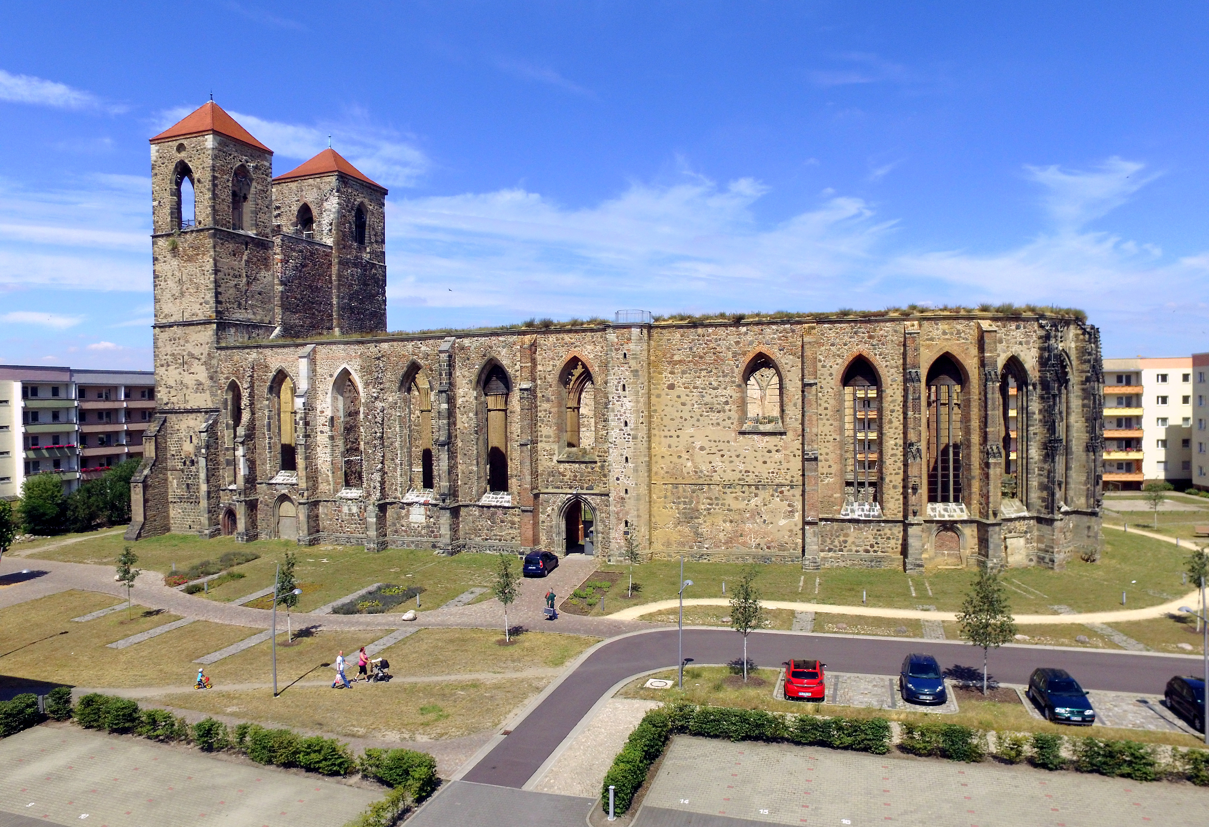 Kirchenruine St. Nikolai Zerbst / Sachsen-Anhalt. Seitenansicht.